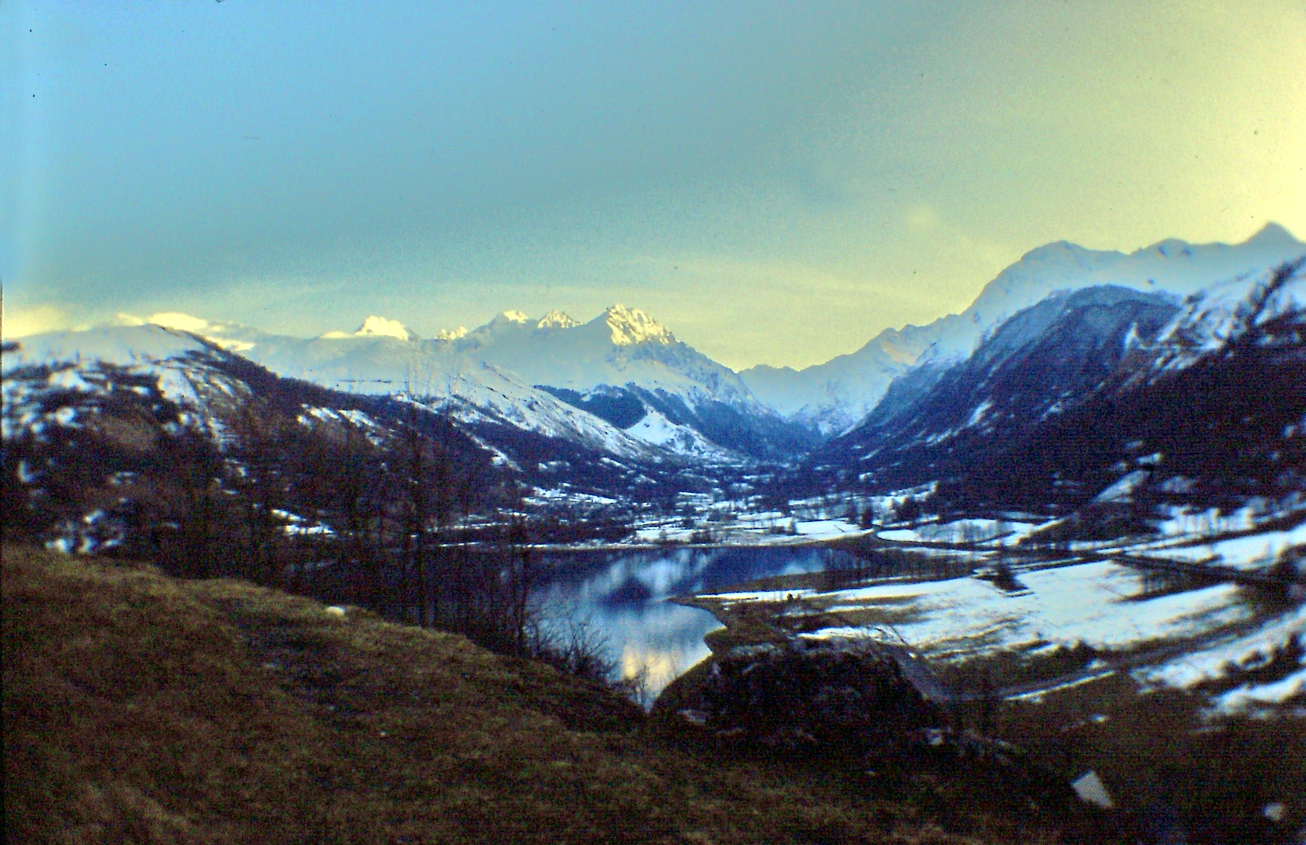 Loudenvielle dans les Hautes-Pyrénées Midi-Pyrénées